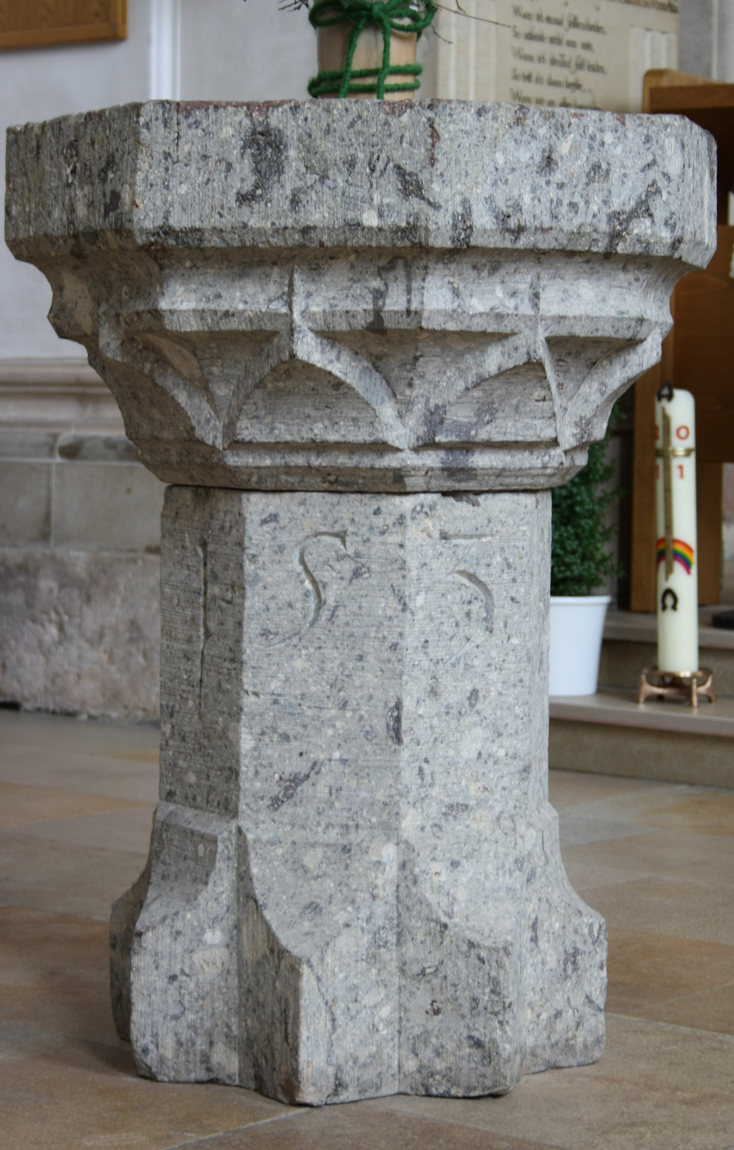 Evangelisch-lutherische Dreifaltigkeitskirche in Haunsheim, einer Gemeinde im Landkreis Dillingen an der Donau (Bayern), Taufstein mit Inschrift 1530, aus Suevit